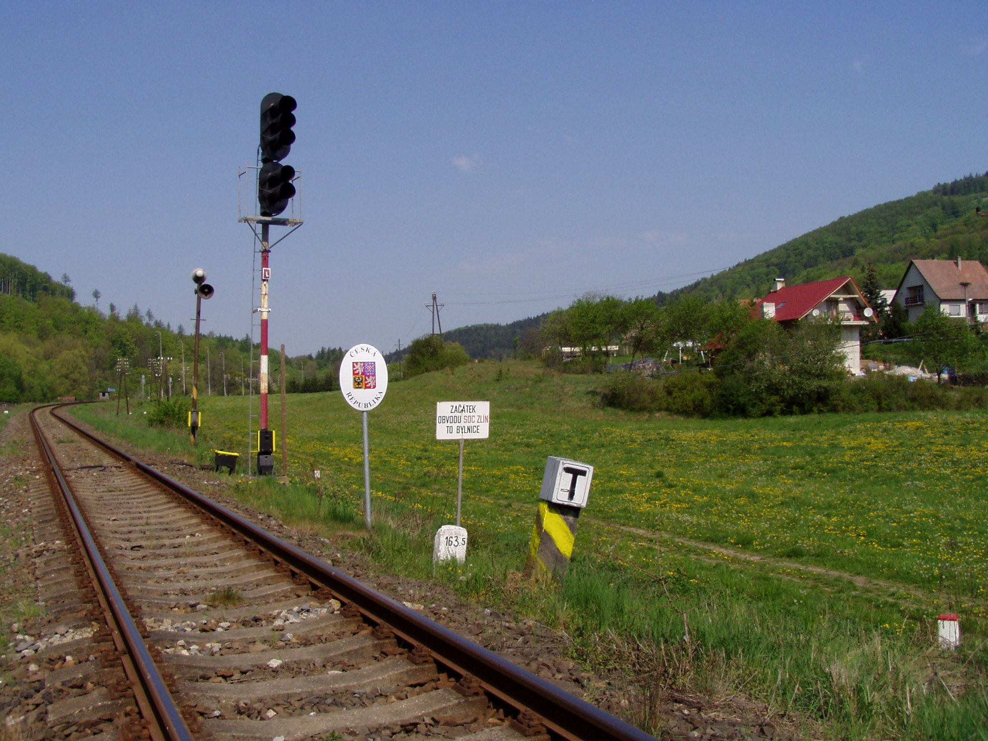 Hraničná čiara je v tomto mieste vysunutá do územia Slovenskej republiky tak, aby bolo vchodové návestidlo stanice Vlársky průsmyk s príslušnou časťou trate ešte na území Českej republiky.